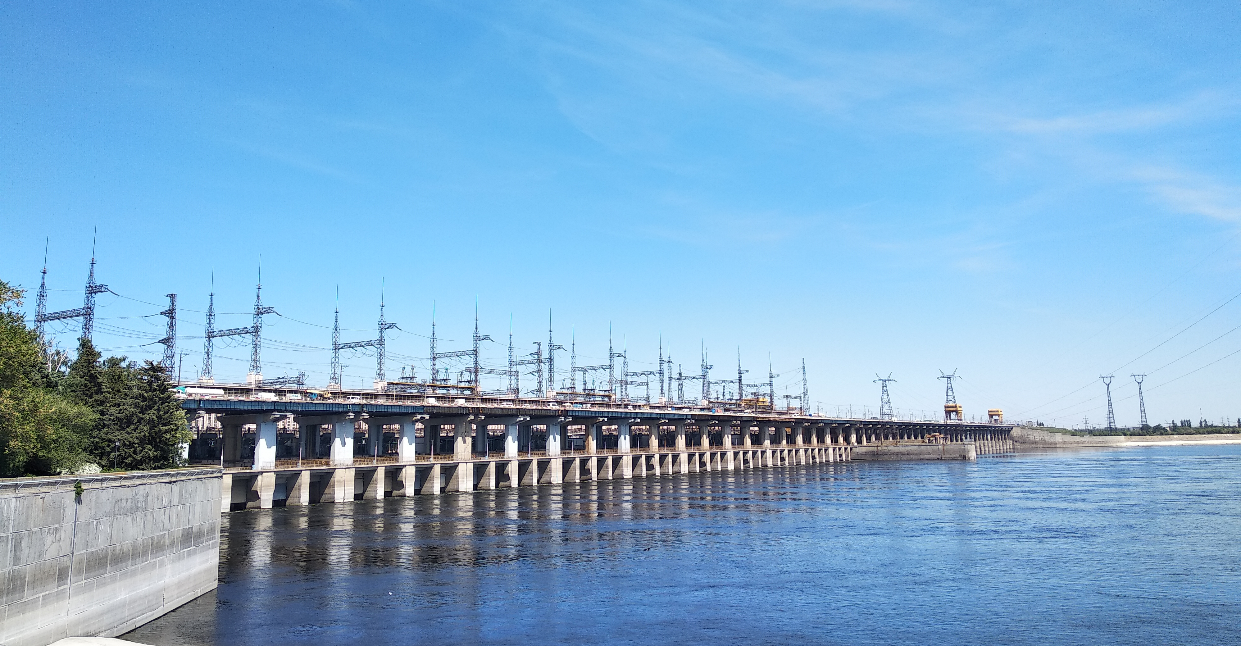 Волжская ГЭС